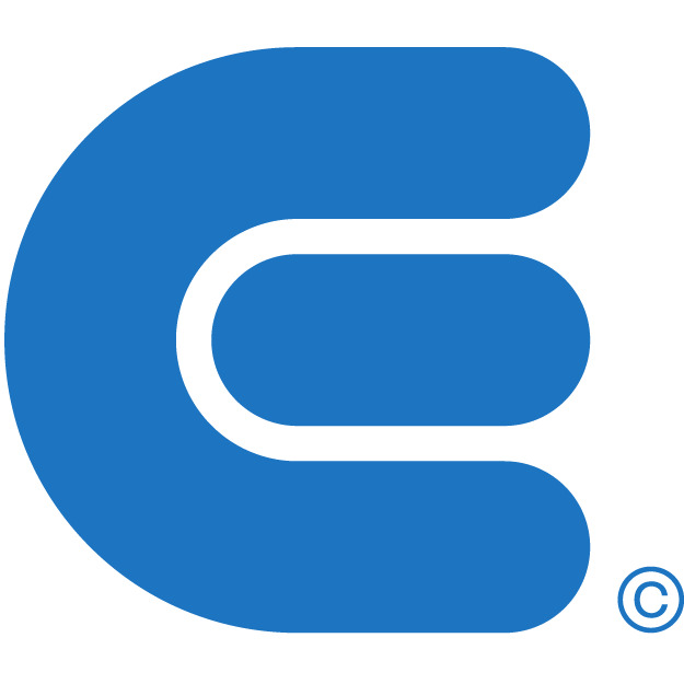 Logo Economipedia